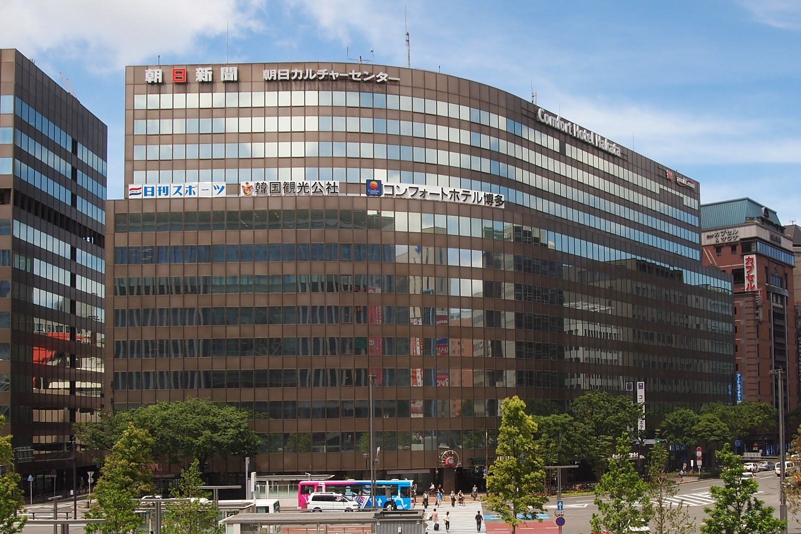 福岡市博多区 コンフォートホテル博多